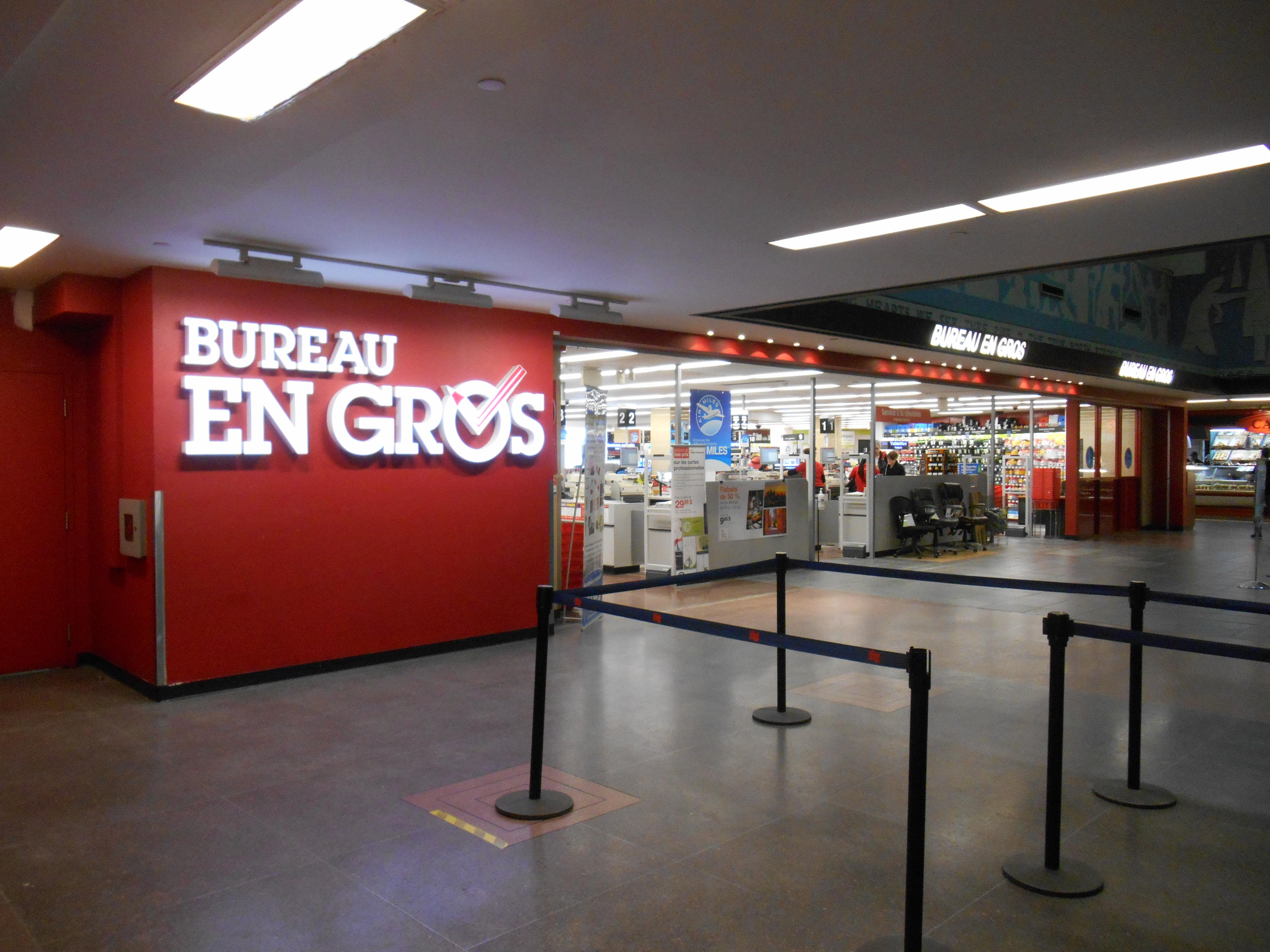 Bureau en Gros, gare centrale de Montréal